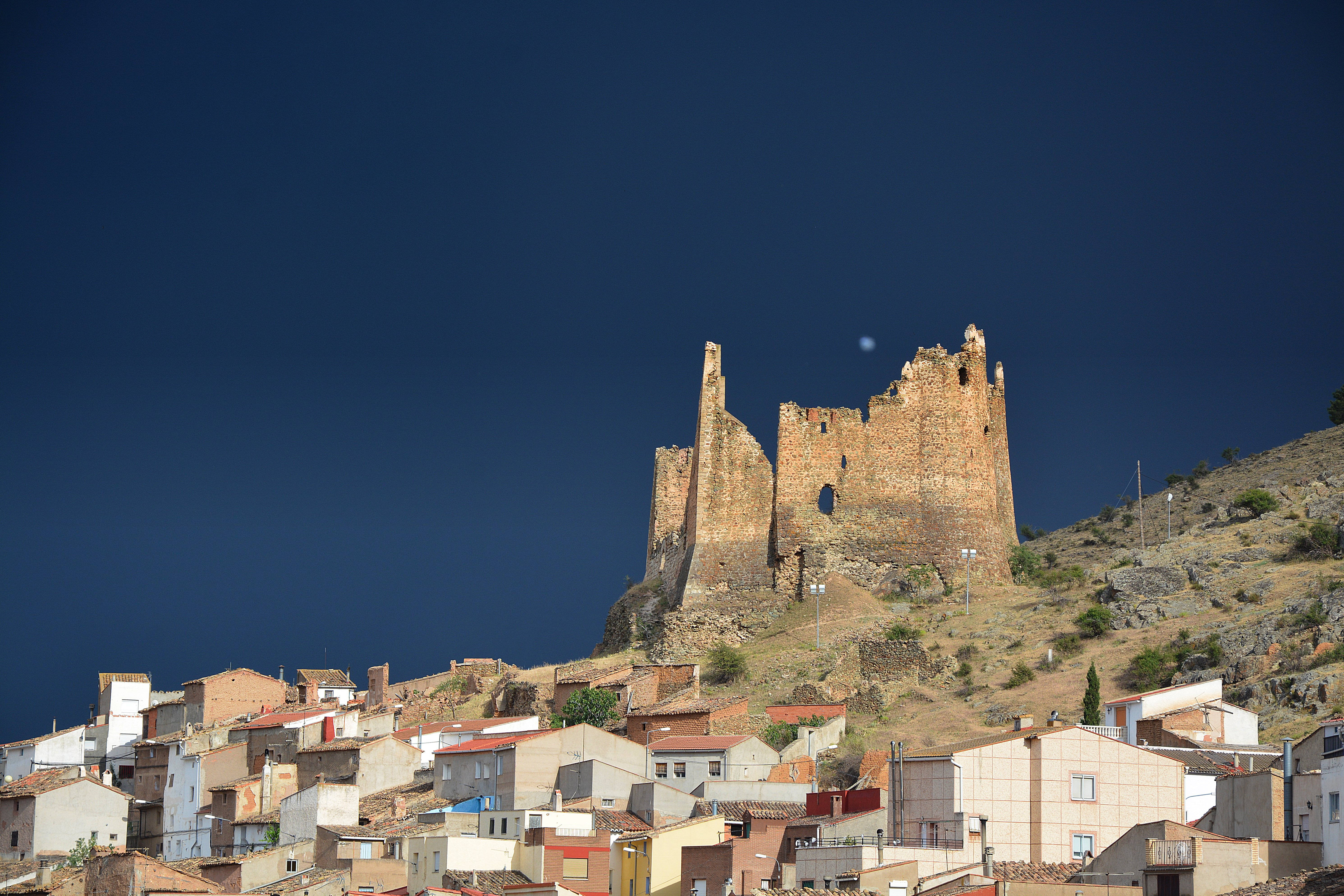 Jarque de Moncayo asienta su caserío bajo su imponente castillo que actualmente se halla en estado de ruina. El origen de Jarque puede proceder, según algunos historiadores, de la palabra exárico: vasallo o colono mudéjar. Es muy probable, ya que se tiene constancia de que mayoritariamente su población profesaba la religión islámica y el urbanismo de la población es el típico musulmán desordenado y de callejuelas sinuosas. De esta ocupación mayoritaria mudéjar proviene la tradición alfarera del lugar. En las calles podemos encontrar topónimos como Alfajarín, que hace referencia a la calle del gremio de los alfareros, o La Tejera, lugar donde se fabricaban tejas. El castillo, cuya construcción es atribuida a Lope Fernández de Luna, debió de levantarse a mediados del siglo XIV tras la Guerra de los Dos Pedros contra Castilla. Es de mampostería, con cuatro torreones en forma tronco-cónica y con almenas apuntadas, netamente mudéjares. Además en la parte inferior de la población se encuentra la iglesia parroquial de la Presentación de la Virgen, un edificio barroco con notable torre